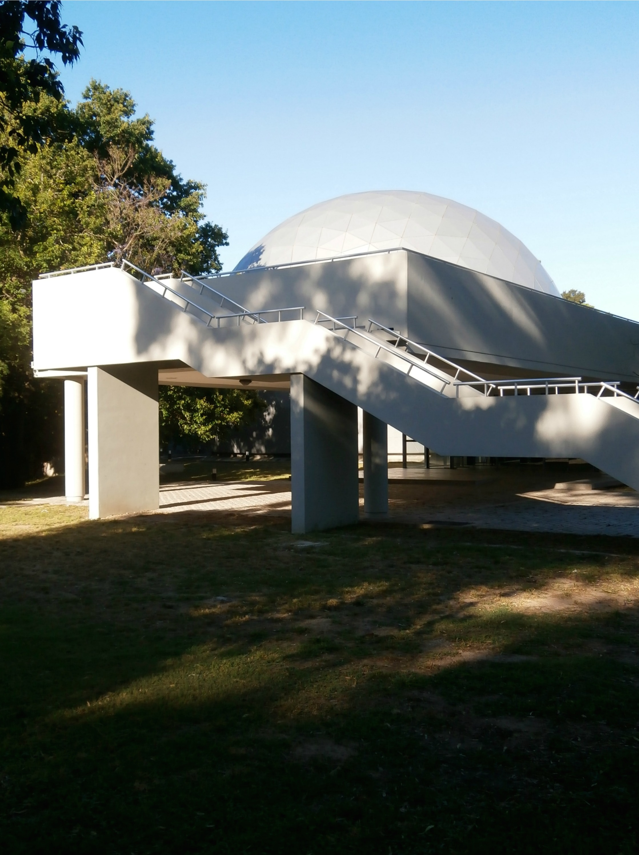 Edificio del Planetario de La Plata en Argentina.